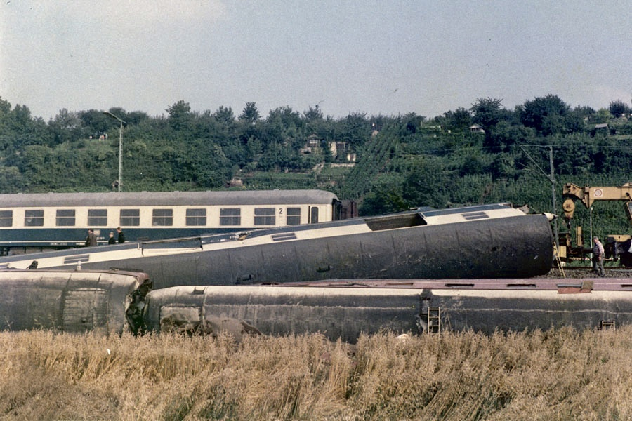 Unfallstelle des Eisenbahnunfalls bei Heilbronn-Klingenberg am 12. August 1984